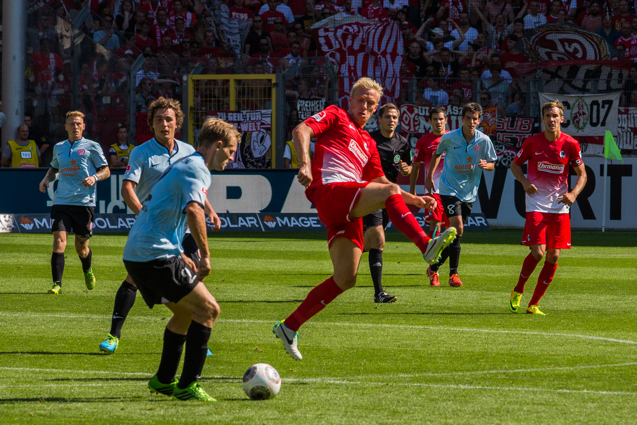 2ème journée de Bundesliga. Match SC Freiburg vs FSVMainz au MAGE SOLAR Stadion le samedi 17 août 2013.